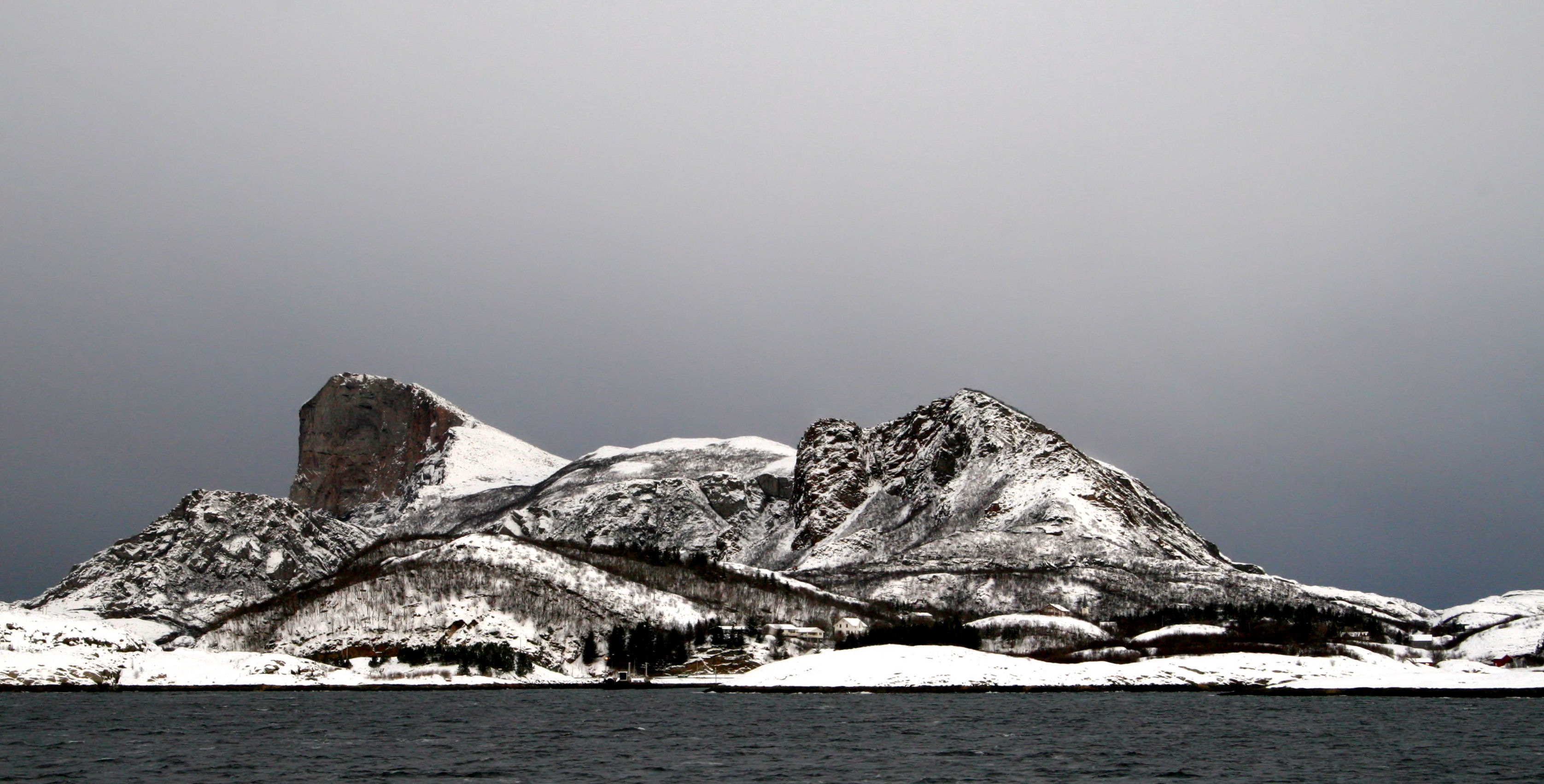 Rødøya island, Norway. Winter 2005-2006